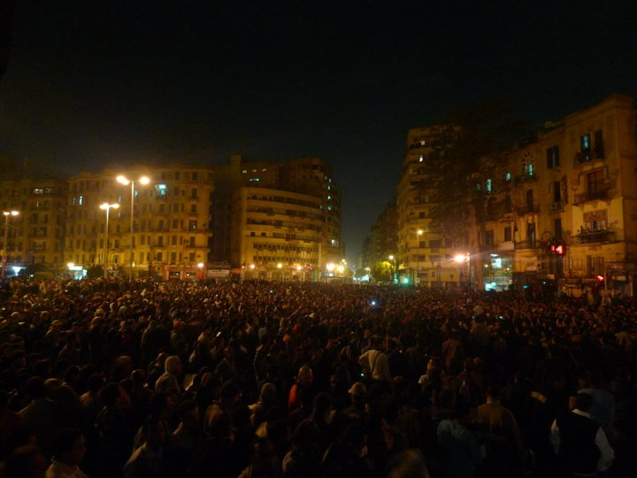 164297_501518534290_511364290_5849813_4735509_n